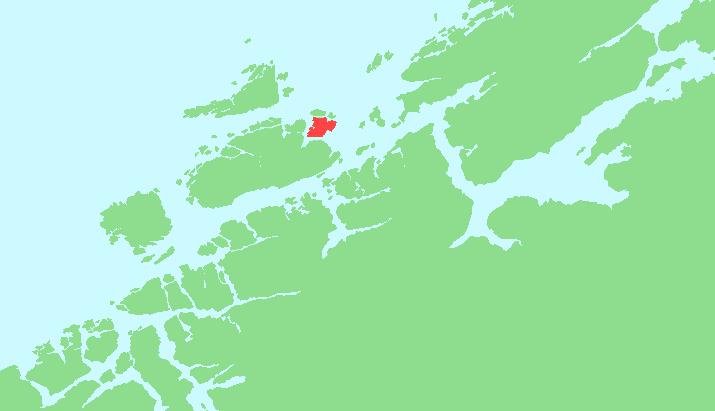 Locator map of Fjellværsøya, Sør-Trøndelag, Norway